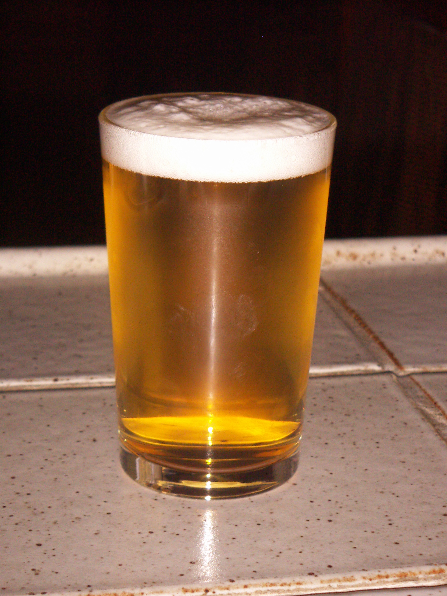 canya de cervesa (200cc)